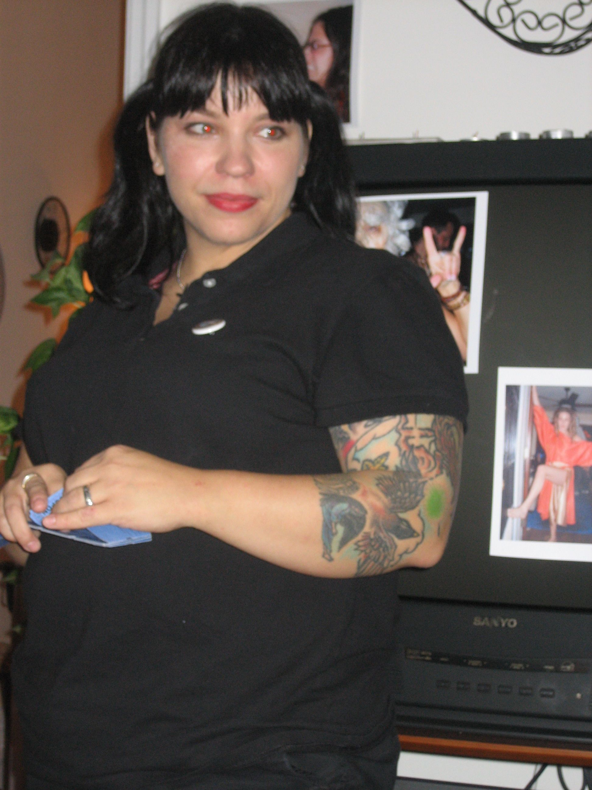 ducky doolittle, sexologist